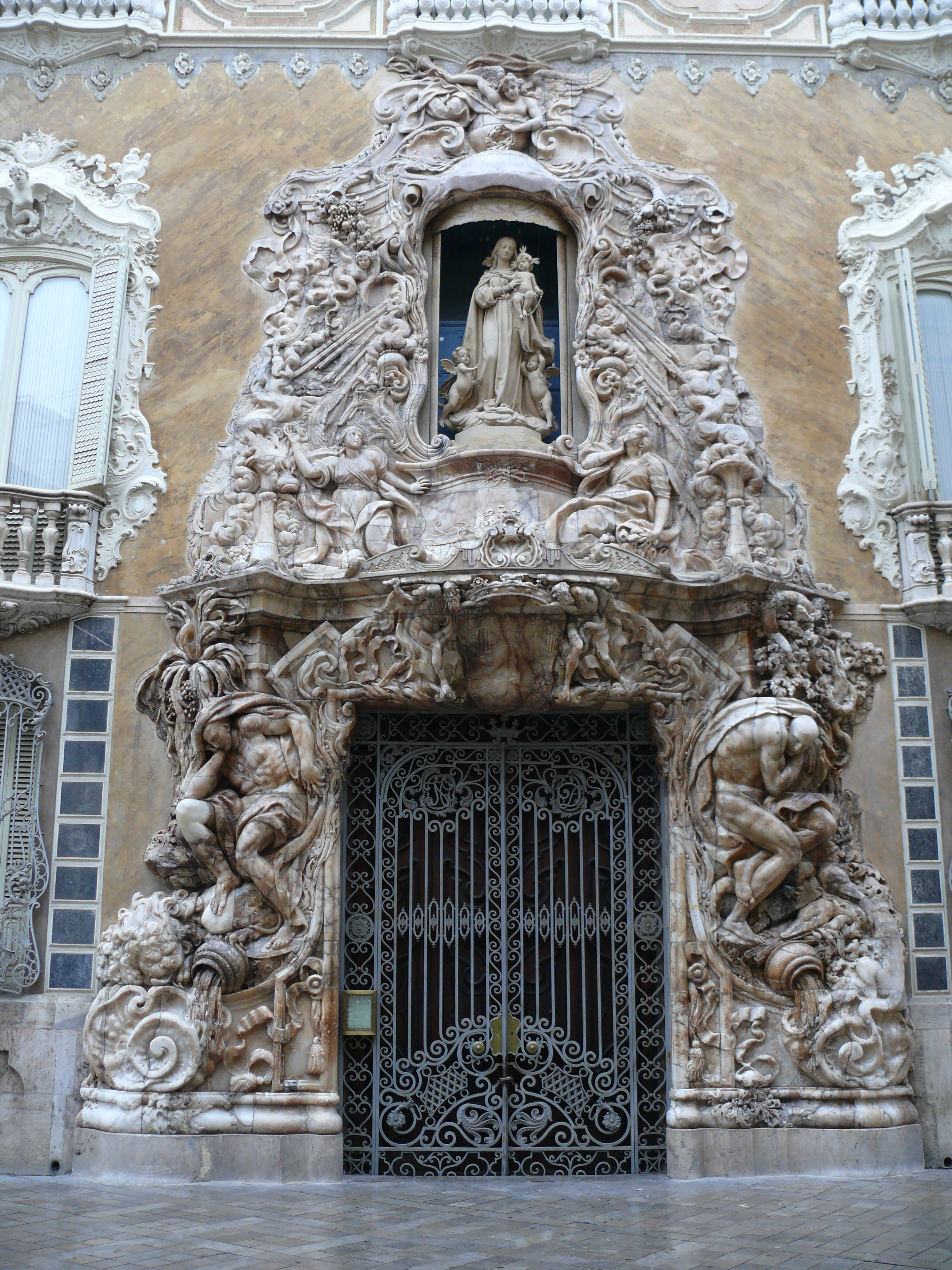 Puerta de entrada del palacio